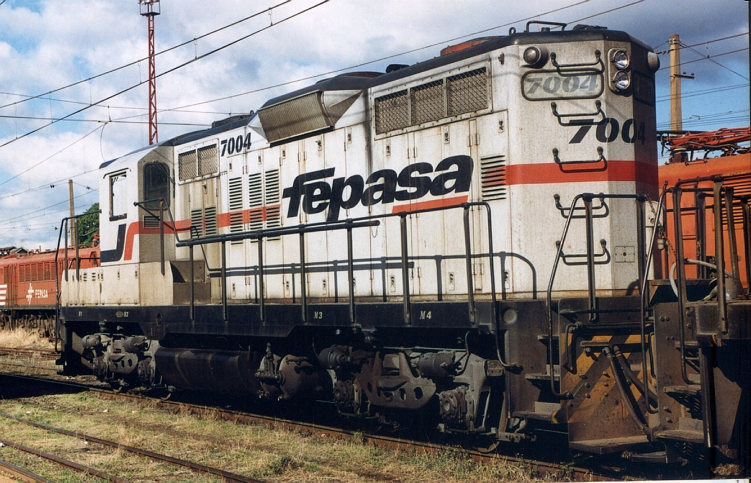 FEPASA 7004, GM GP9 Triagem Pta-Bauru-SP-Brasil